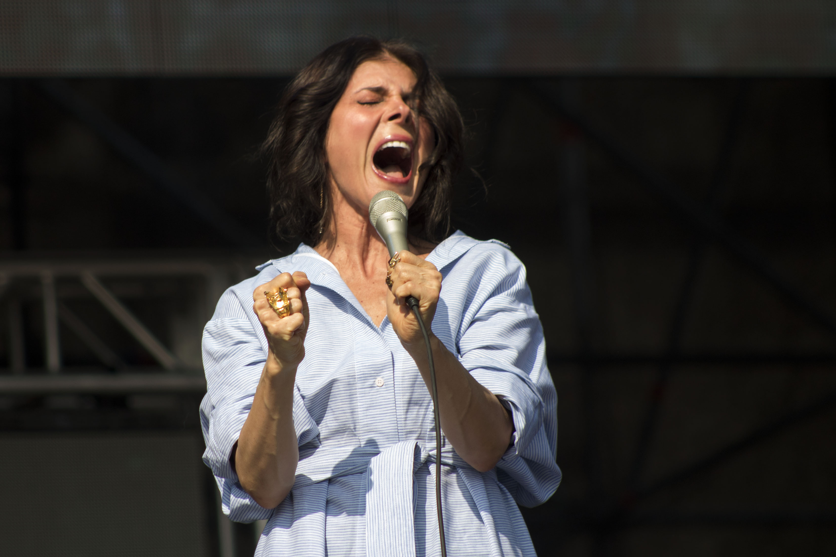 Sábado 12 de noviembre de 2017. Como parte de las actividades de la Semana de las Juventudes del 2017, este sábado 12 de noviembre se desarrolló un segundo concierto masivo en la plancha del Zócalo capitalino. Las bandas que se presentaron en esta ocasión fueron: Marcelo Viejo, Charlie Rodd, Ely Guerra, Dorian, Chetes, La Gusana Ciega, División Minúscula, El Tri y Fatboy Slim. Fotografía: Carlos Luna / Secretaría de Cultura CDMX